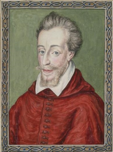 ensemble de relevé pour Gaignières des costumes.